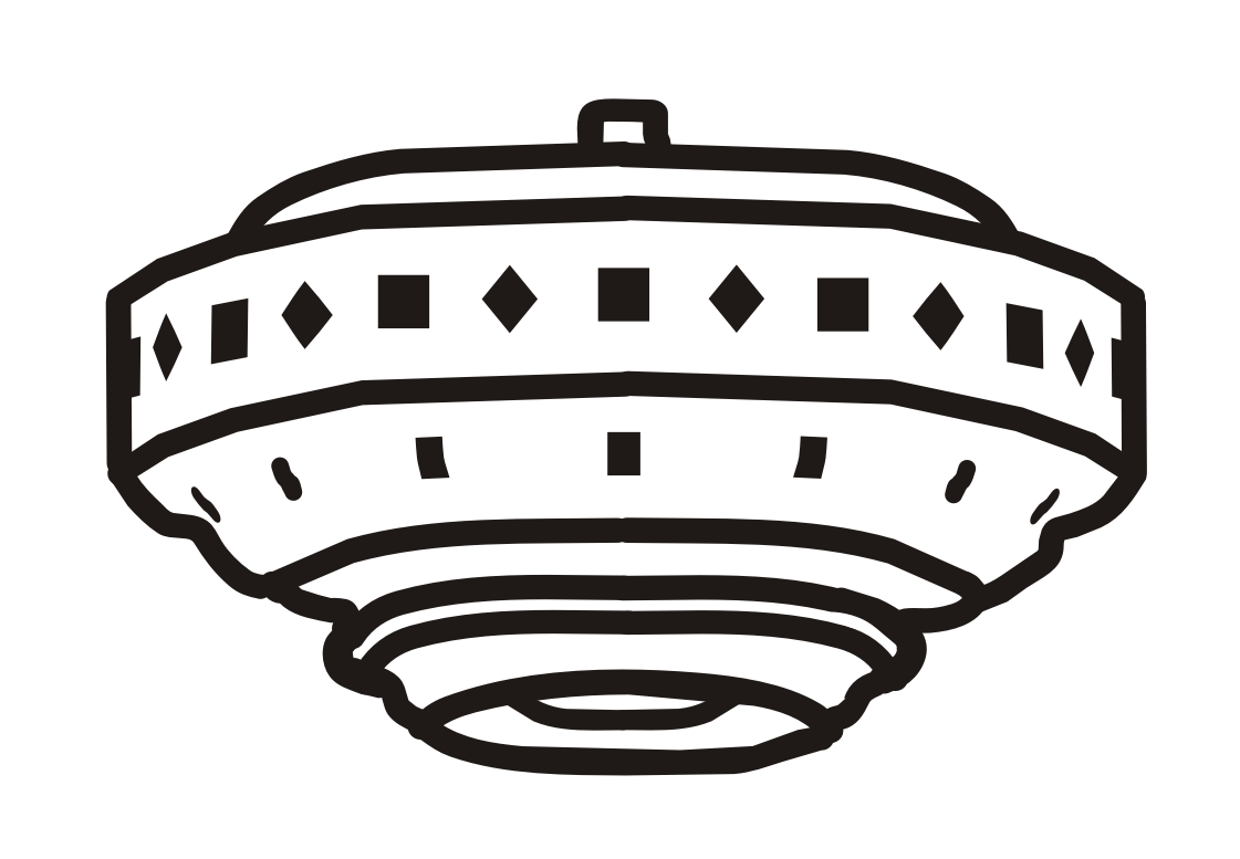 Skizze eines Gulf-Breeze-Ufos/Drawing of an Gulf Breeze Ufo